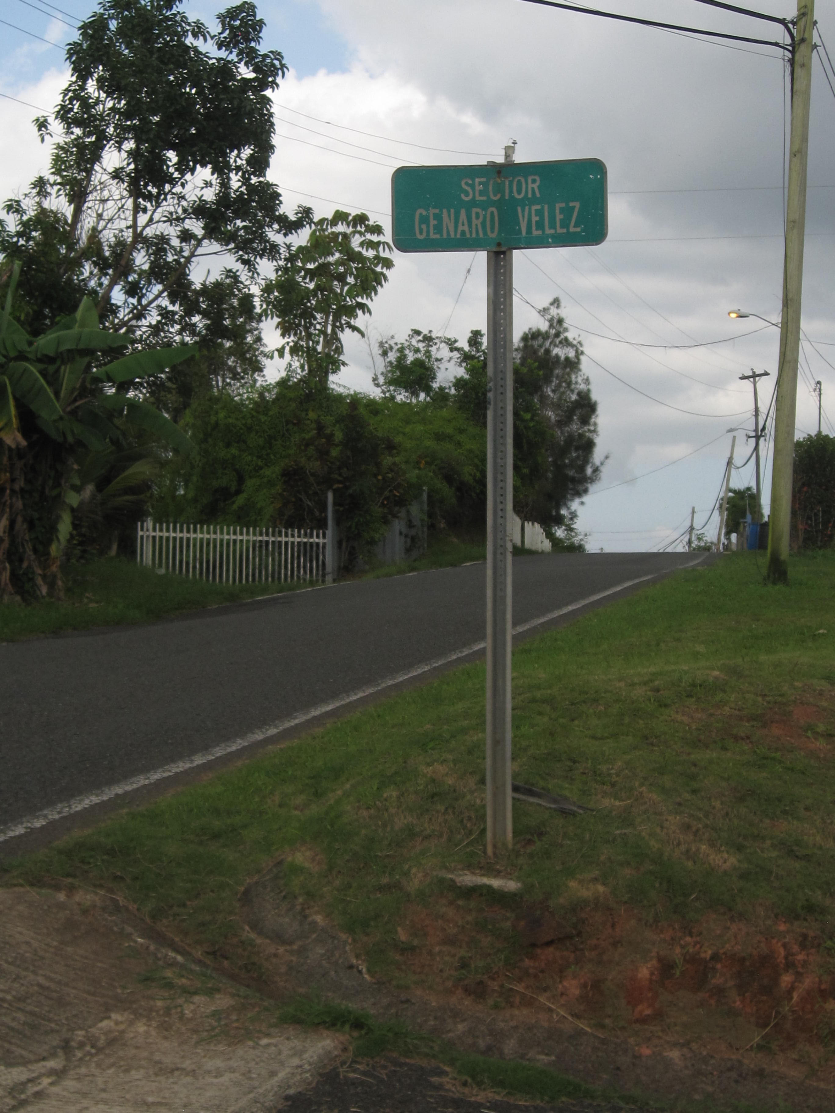 Sector Genaro Velez en Barrio Perchas 2, San Sebastián, Puerto Rico